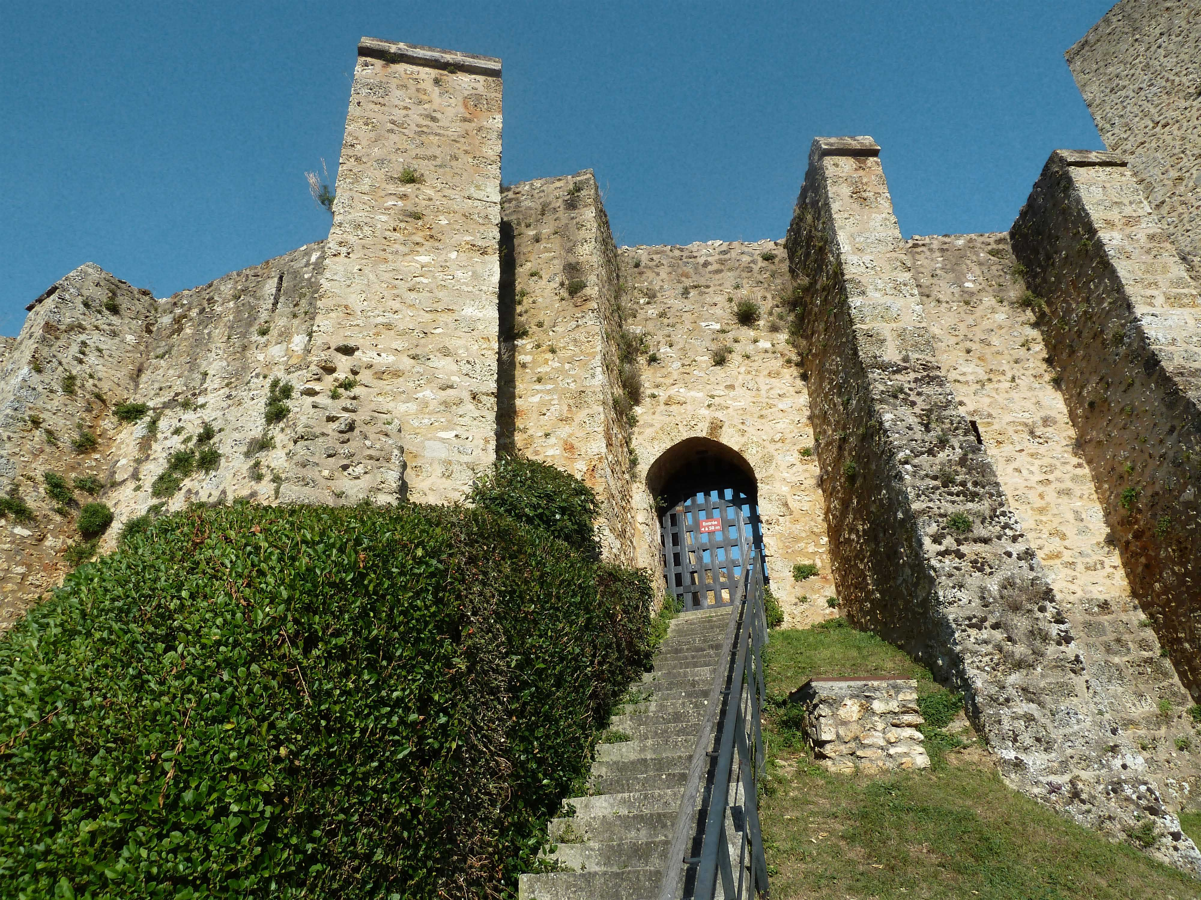 11è au 19è siècle